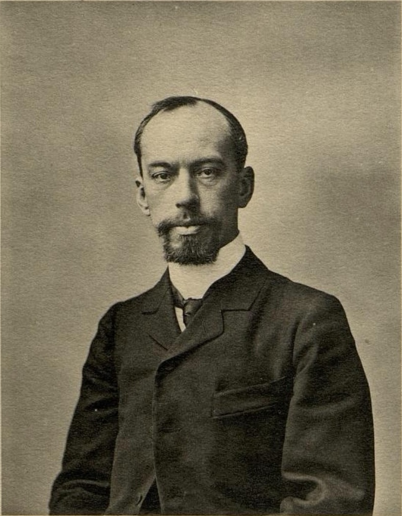 Фотография Александра Карловича фон Мекка, директора Московско-Казанской железной дороги, основателя и первого председателя Русского горного общества